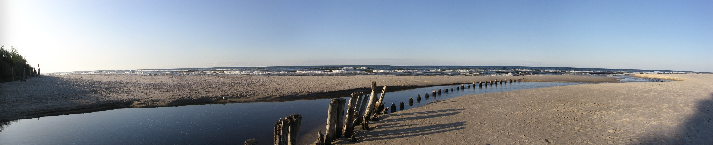 ujście Karwianki do Bałtyku